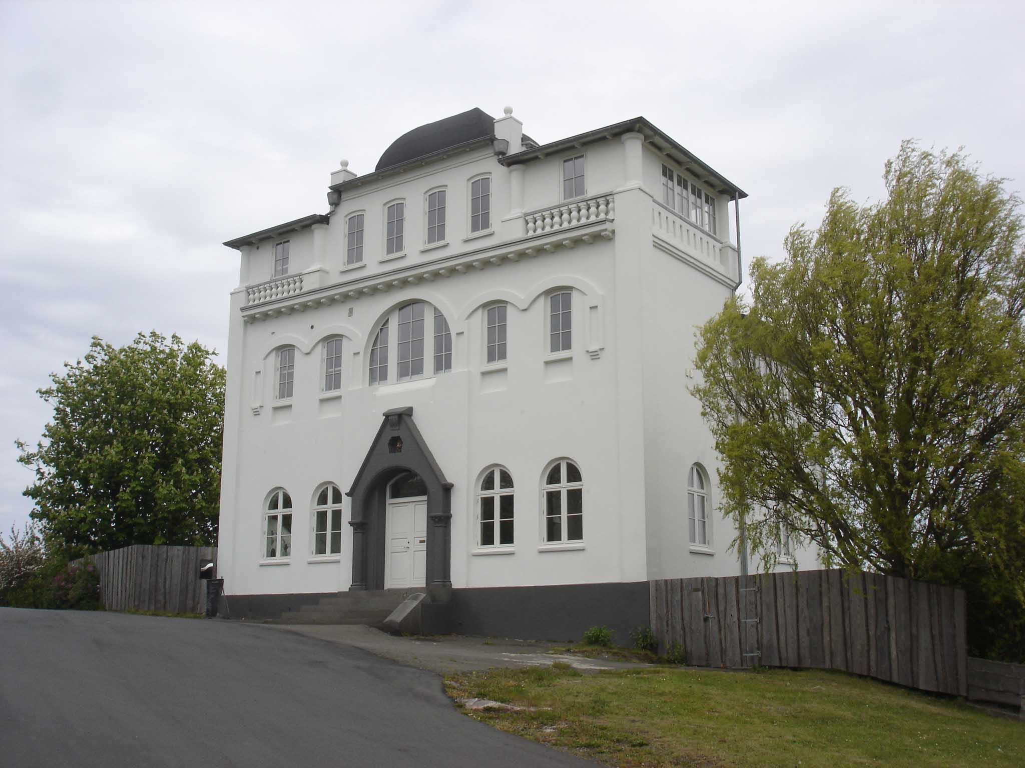 "Kaffeslottet" i Gudhjem, opført i 1912 af en københavnsk kaffegrosserer med materialer fra Københavns 2. hovedbanegård.